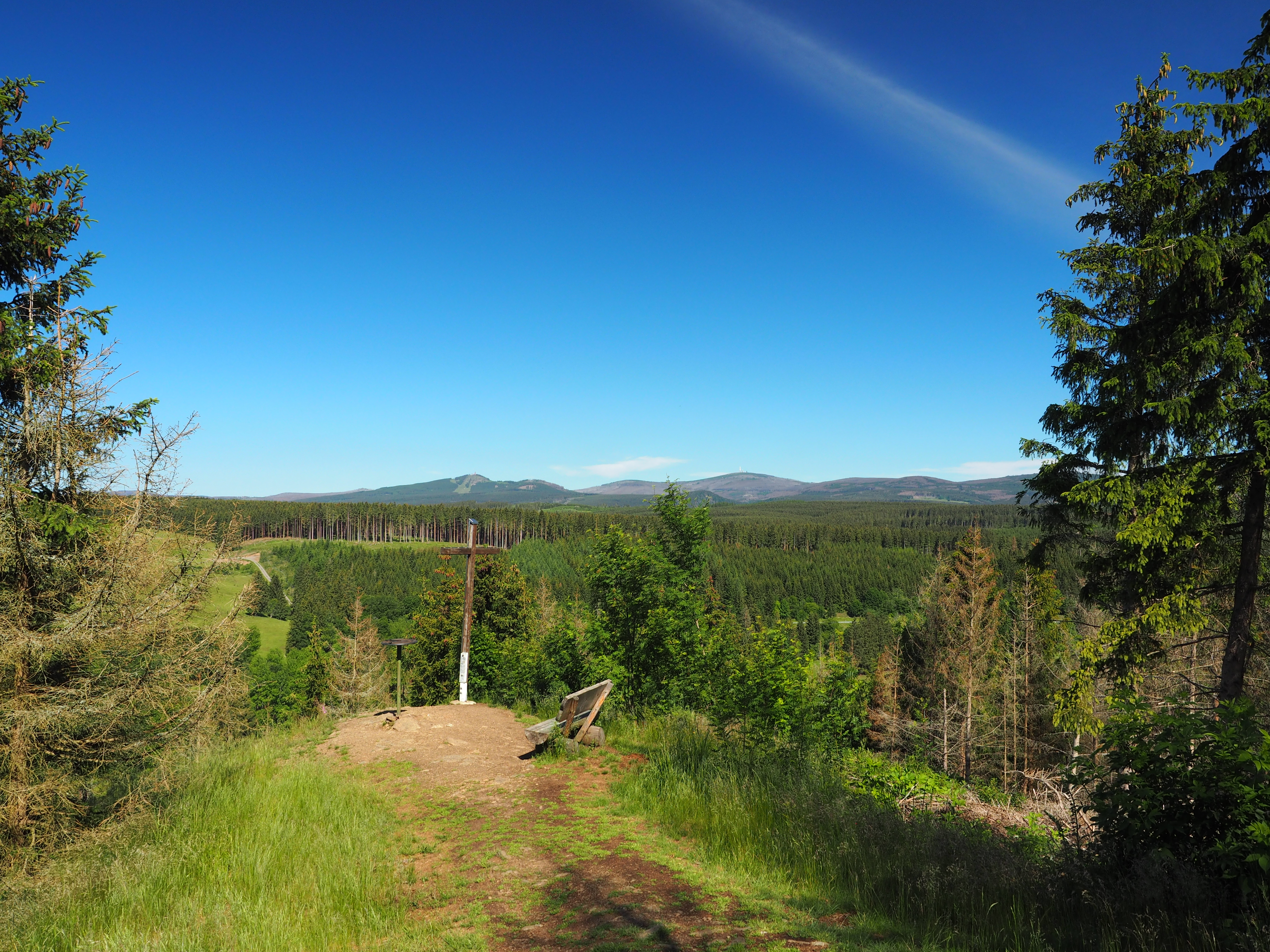 Aussichtspunkt mit Gipfelkreuz des Kapitelberges im Landschaftsschutzgebiet LSG 0032WR "Harz und Vorländer".